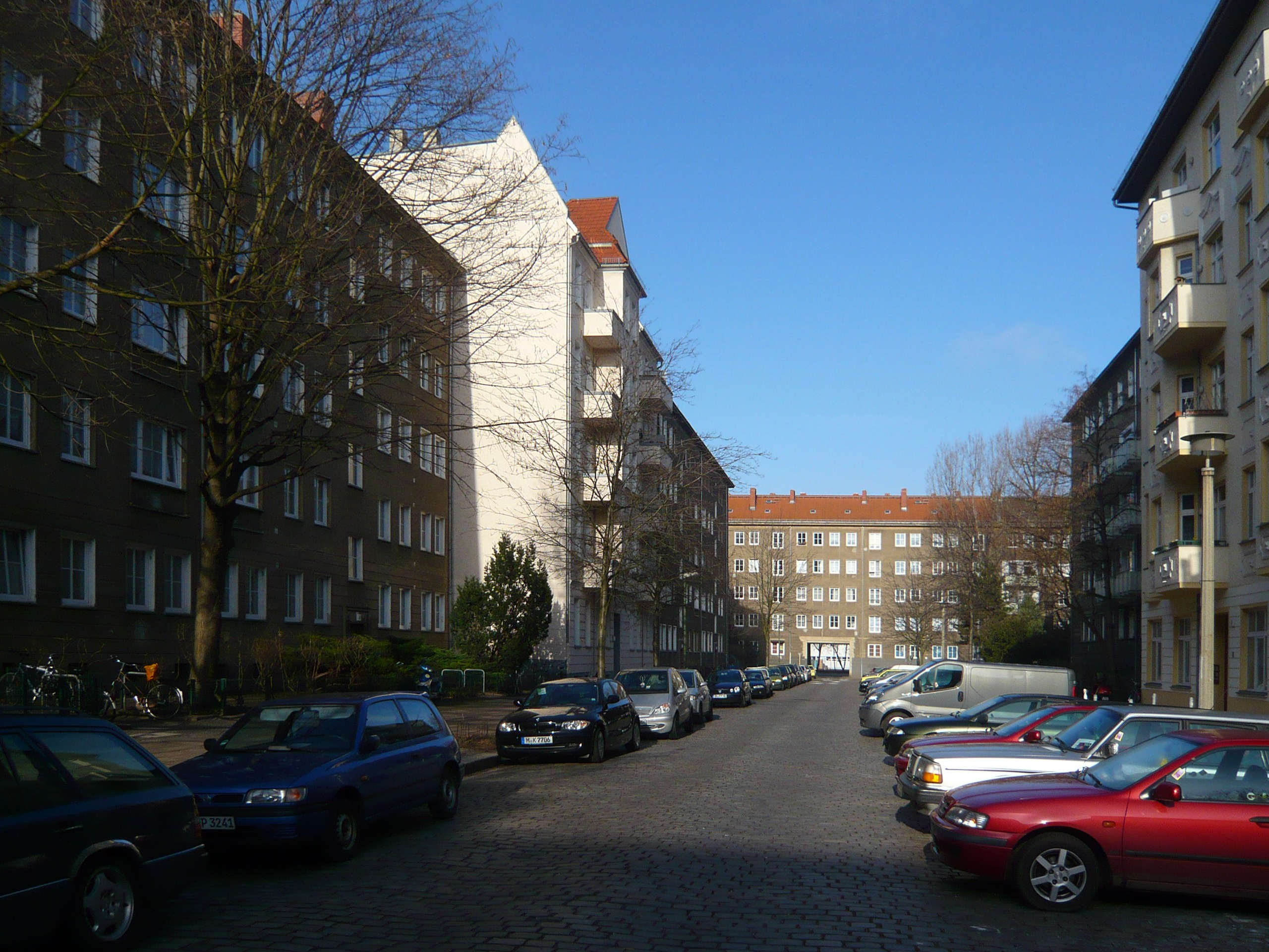 Berlin-Prenzlauer Berg